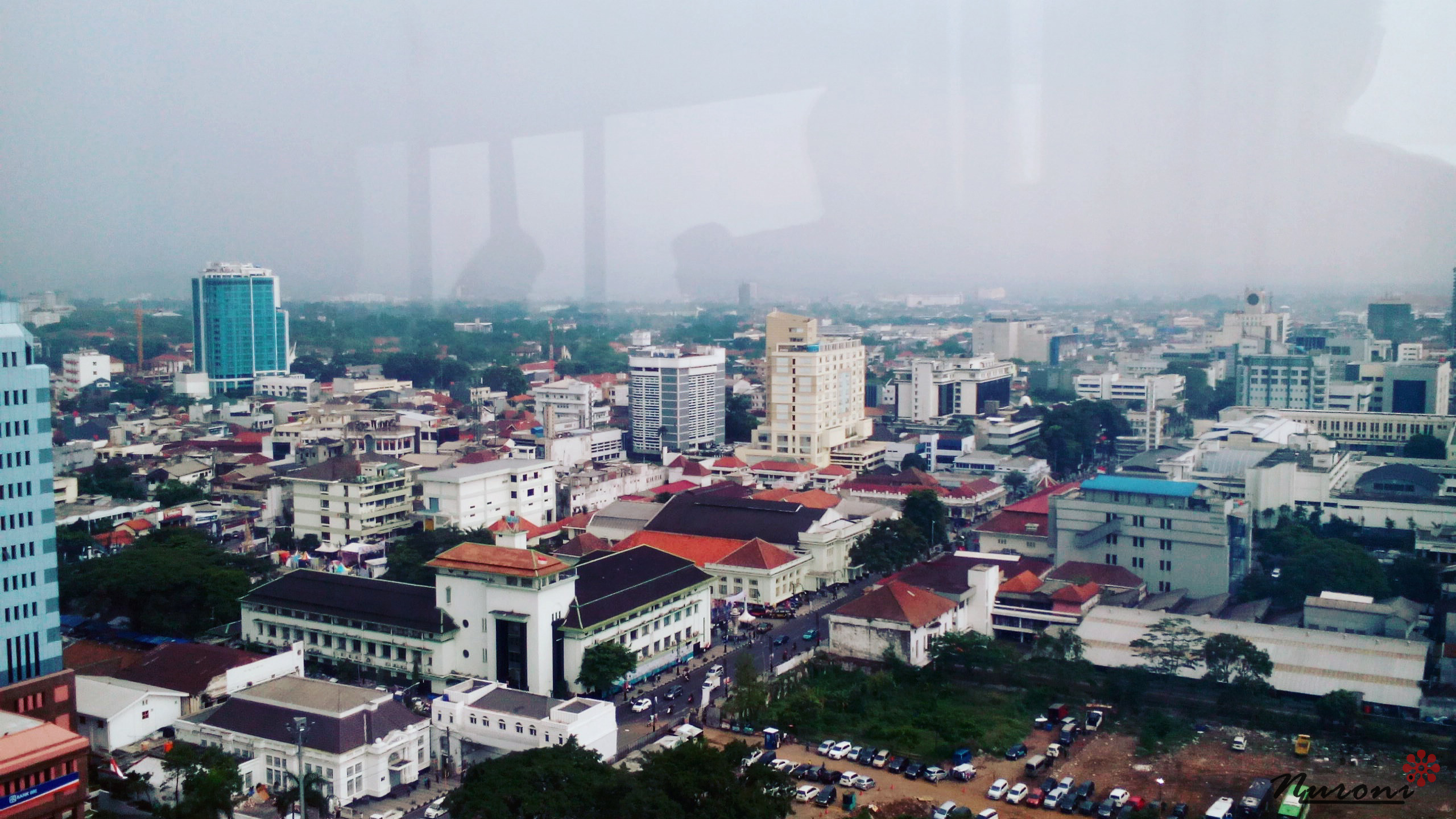 Pemandangan Masjid Raya Bandung Jawa Barat bagian timur